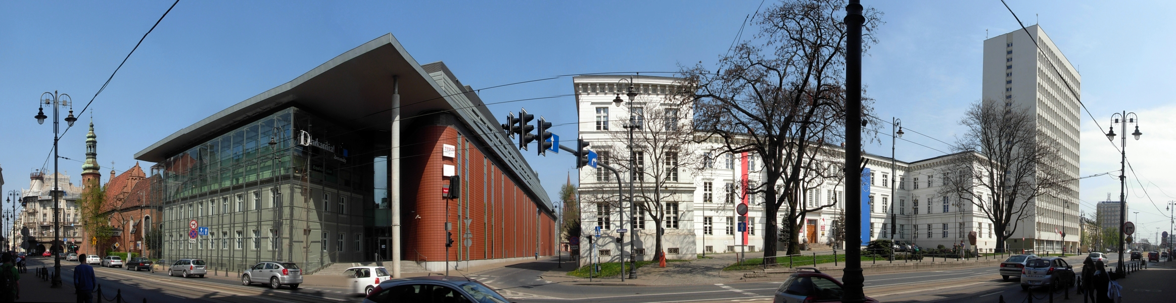 Ulica Jagiellońska w Bydgoszczy